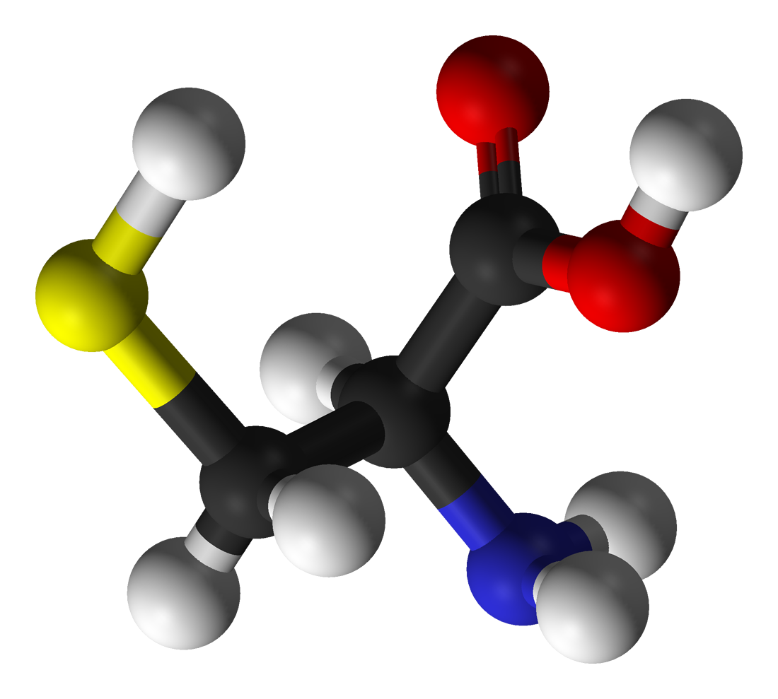 L-cysteine 3-D balls